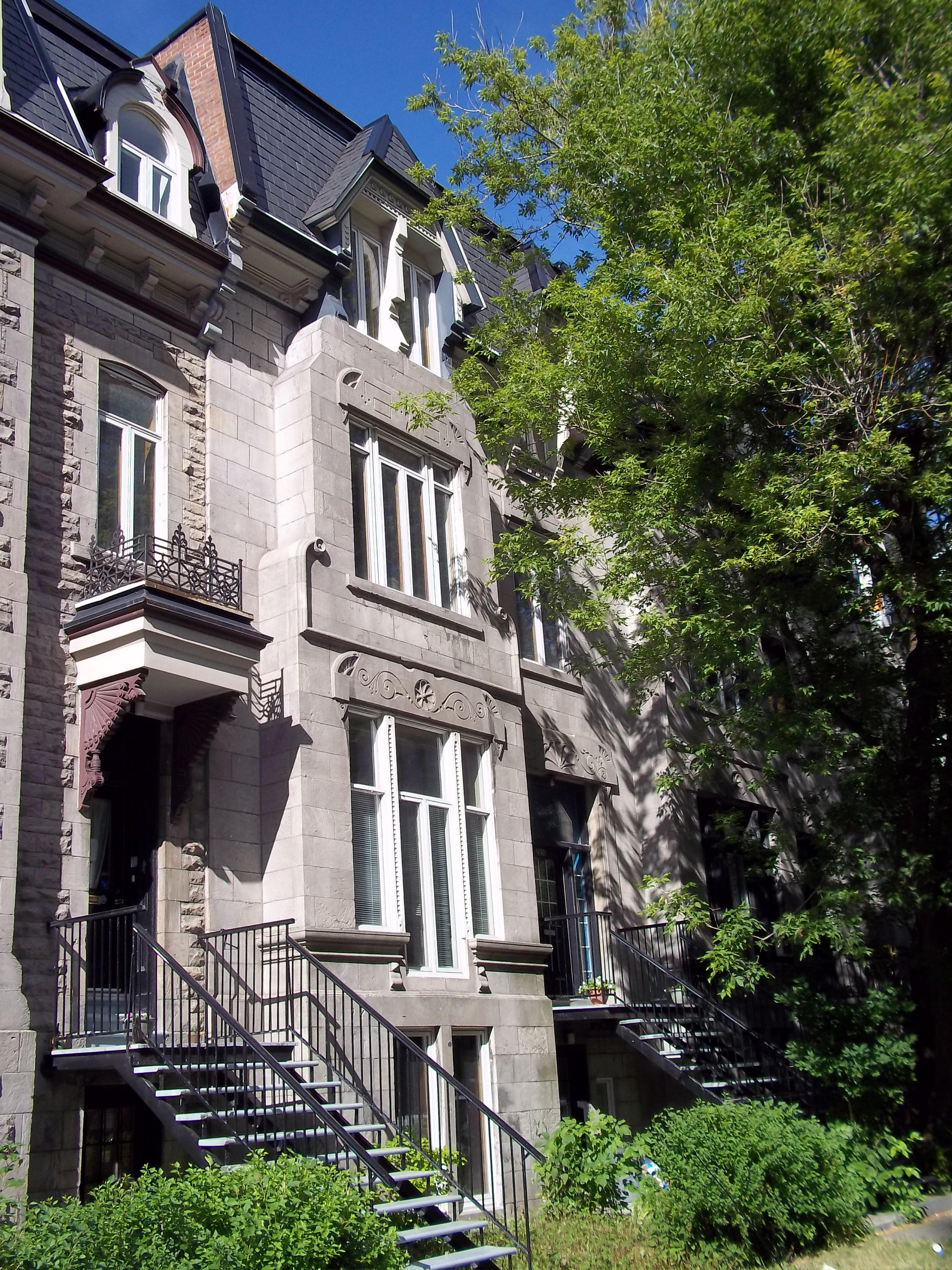 Maisons Janvier-Arthur-Vaillancourt, 2054-2056, rue Jeanne-Mance, Montréal